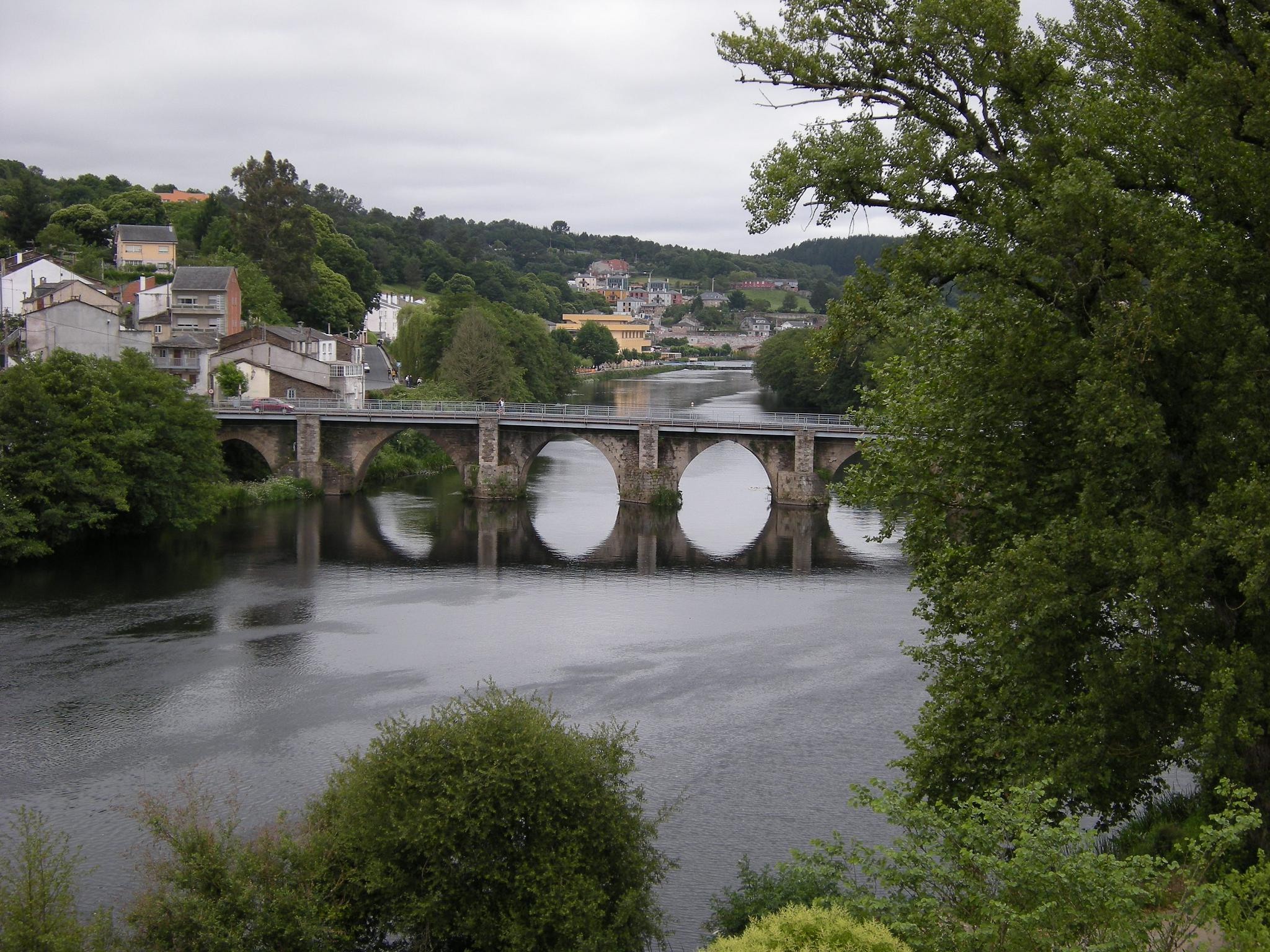 El puente romano de Lugo, formaba parte de la vía XIX que unía Lucus Augusti con Bracara Augusta, que eran las dos capitales romanas de la Hispania noroccidental, junto con Asturica Augusta. Fue objeto de varias reconstrucciones durante los siglos XII, XIV y XVII.